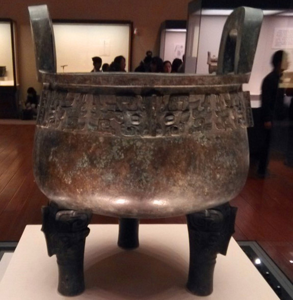 大盂鼎，中华人民共和国国家一级文物，在清道光初年出土于陕西省岐山县，现藏于中国国家博物馆